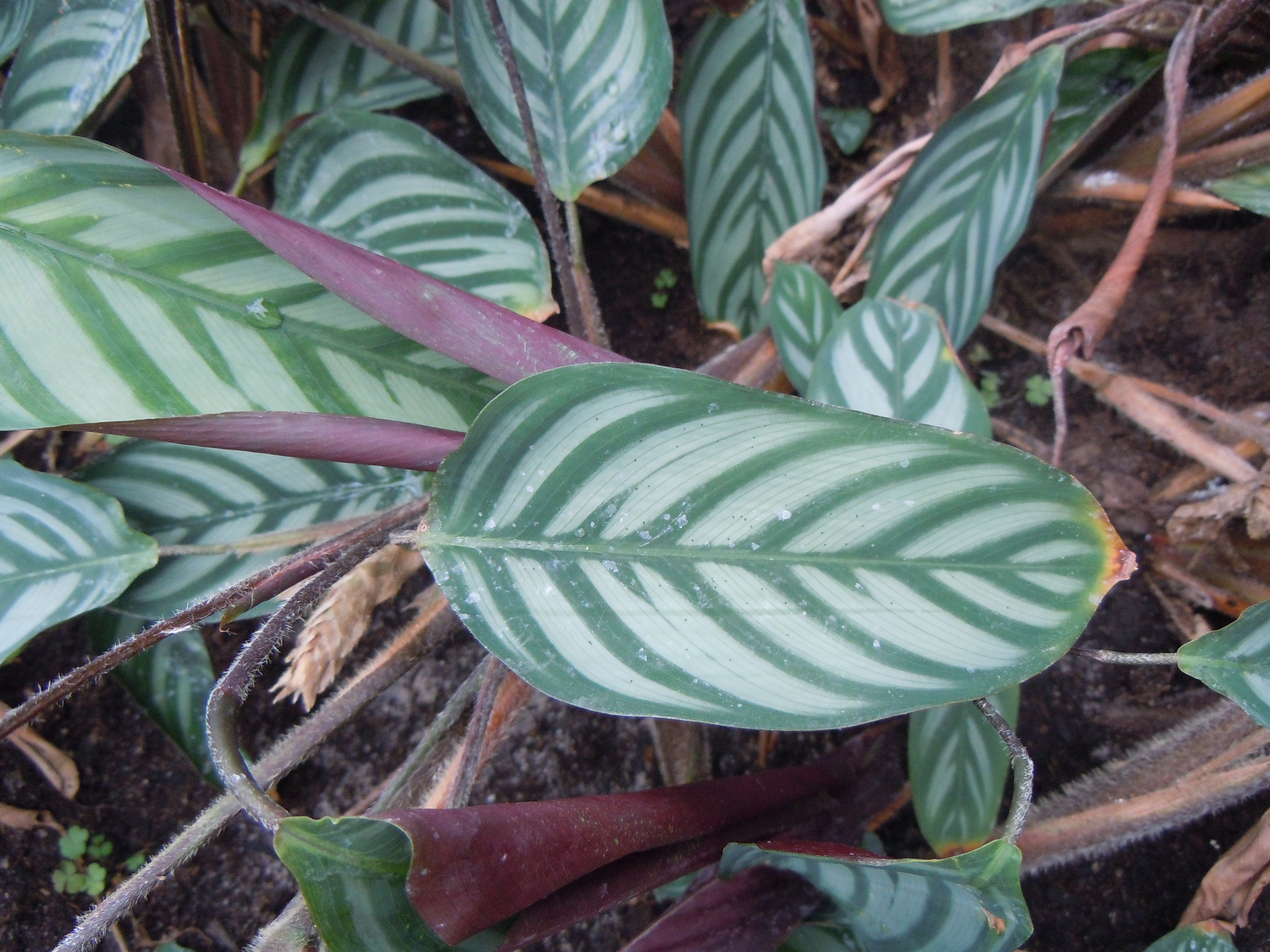 Vue de feuille de Ctenanthe setosa cultivée dans les Serres d'Auteuil